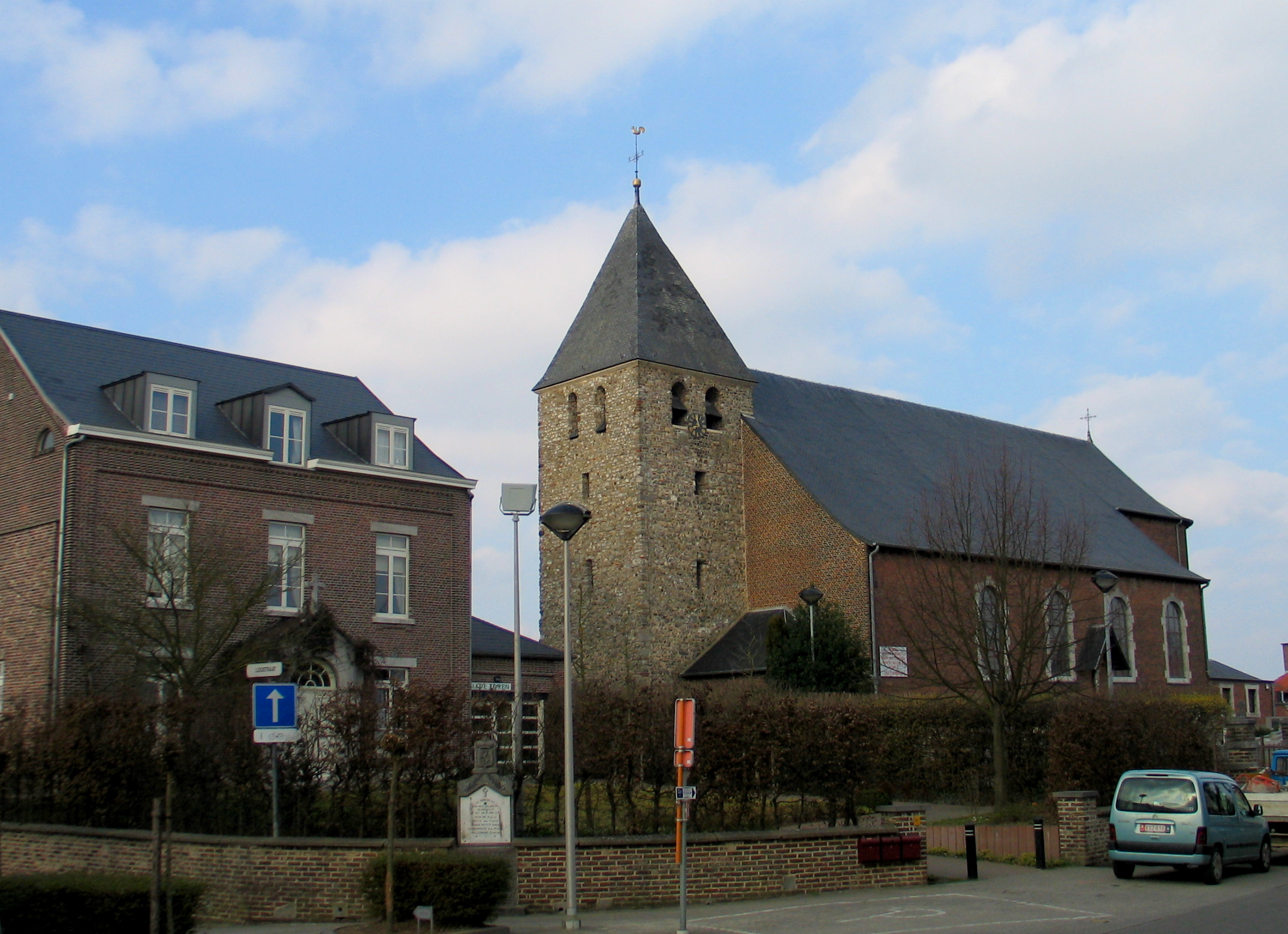 Sint-Agapituskerk in Vliermaal, België